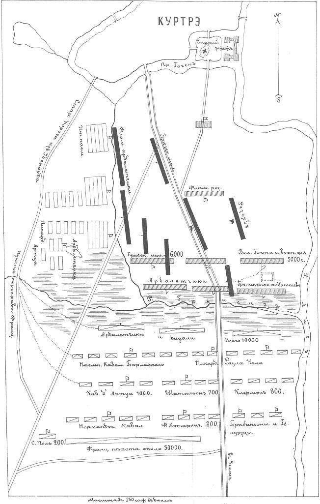 Схема сражения при Куртре.